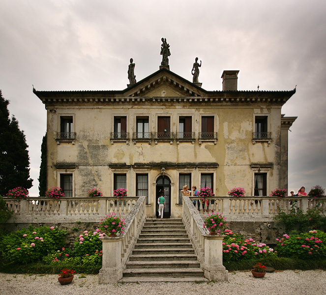 Villa Valmarana ai Nani, Vicenza, Italy: Front